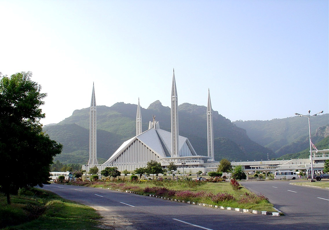 Faisal mosque